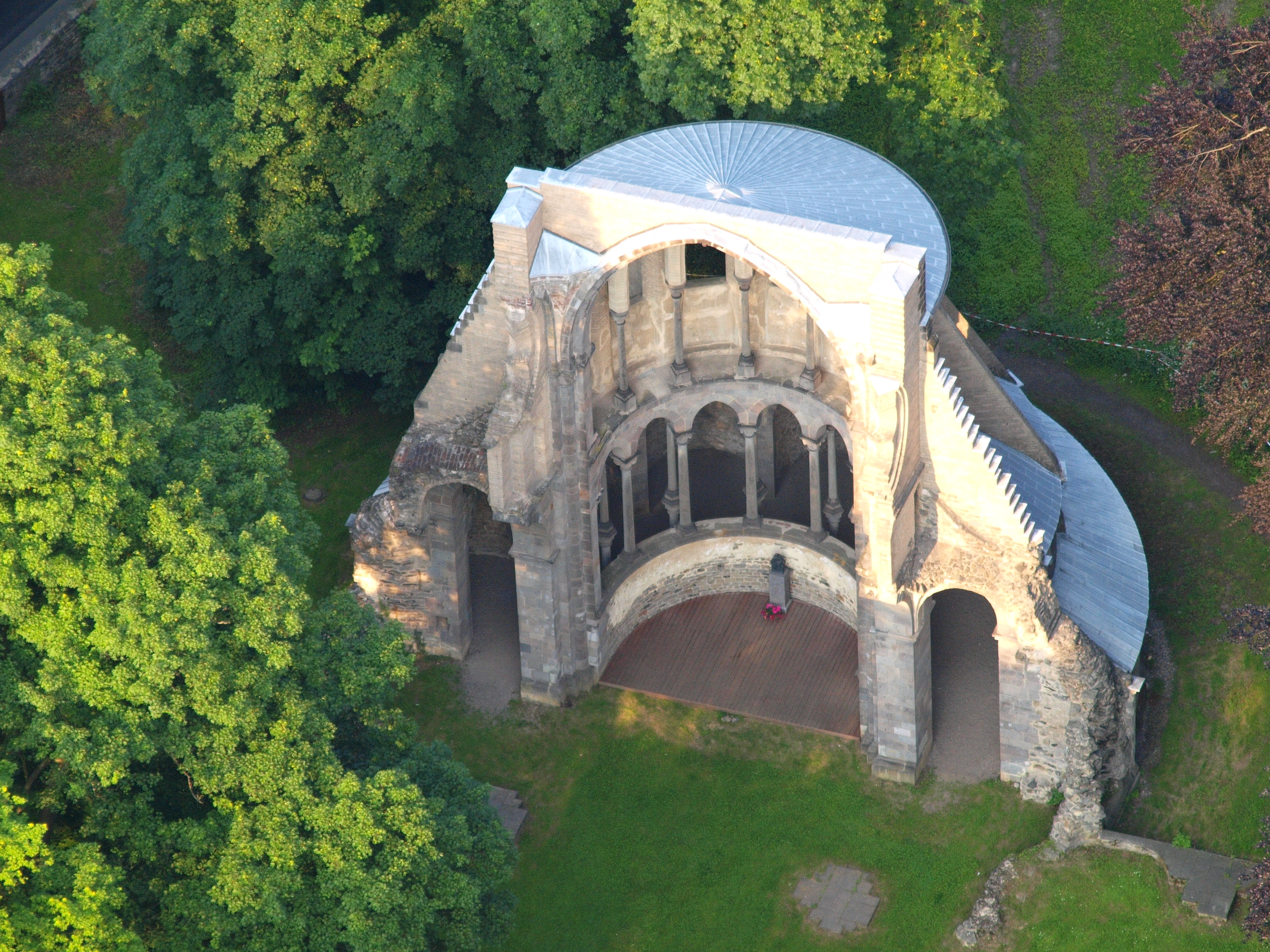 Ruine des Klosters Heisterbach: Luftaufnahme